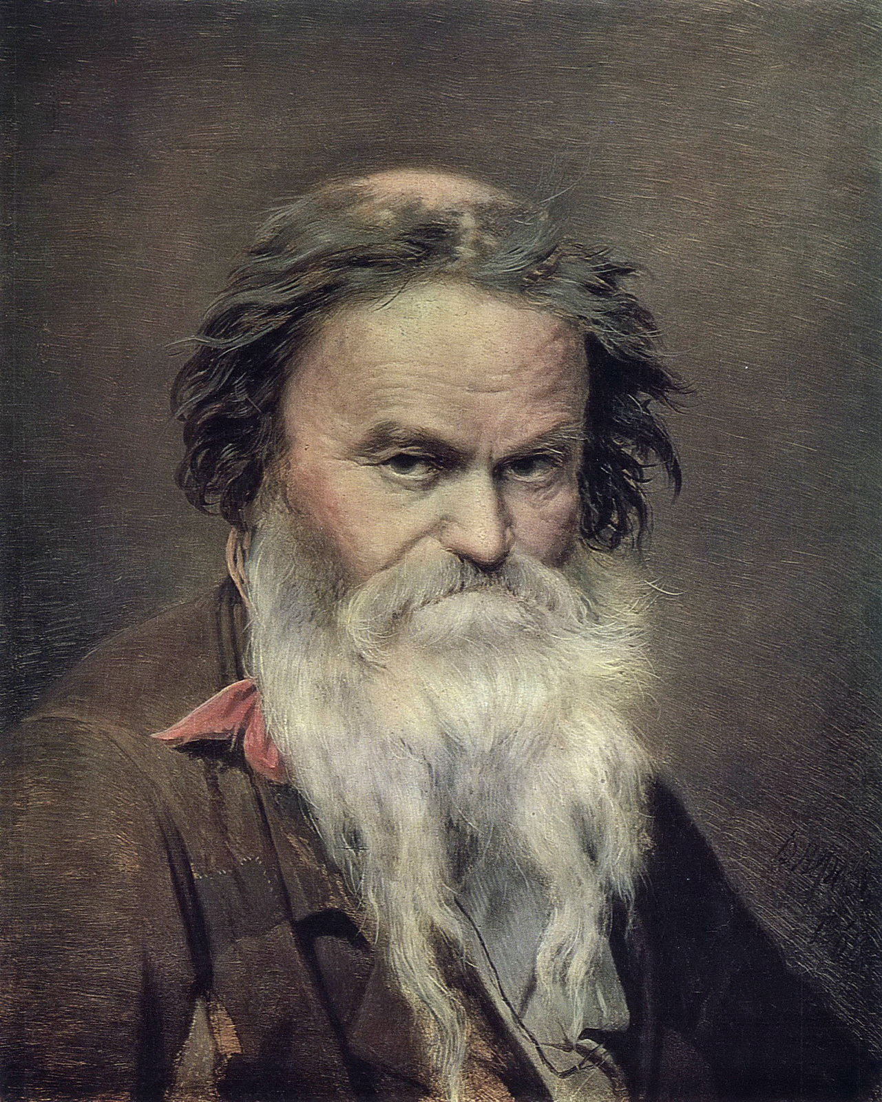 Фомушка-сыч